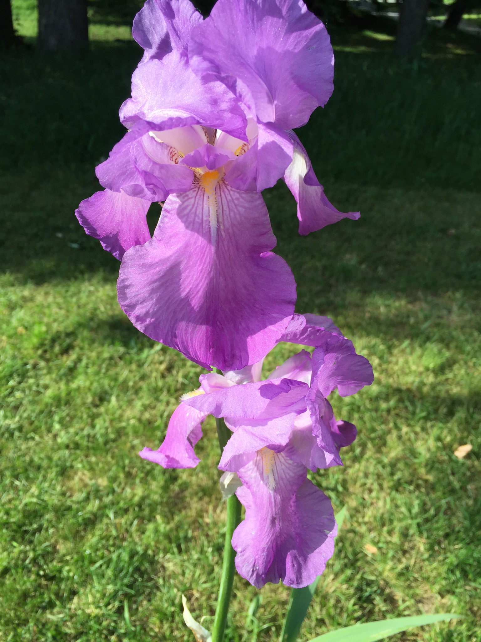 Iris Thaïs (Cayeux - 19226)